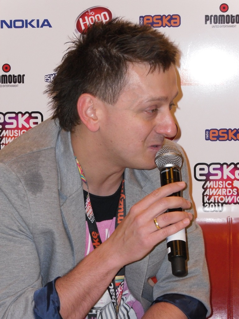 Zdjęcie zrobione podczas Eska Music Awards 2011 w katowickim Spodku.